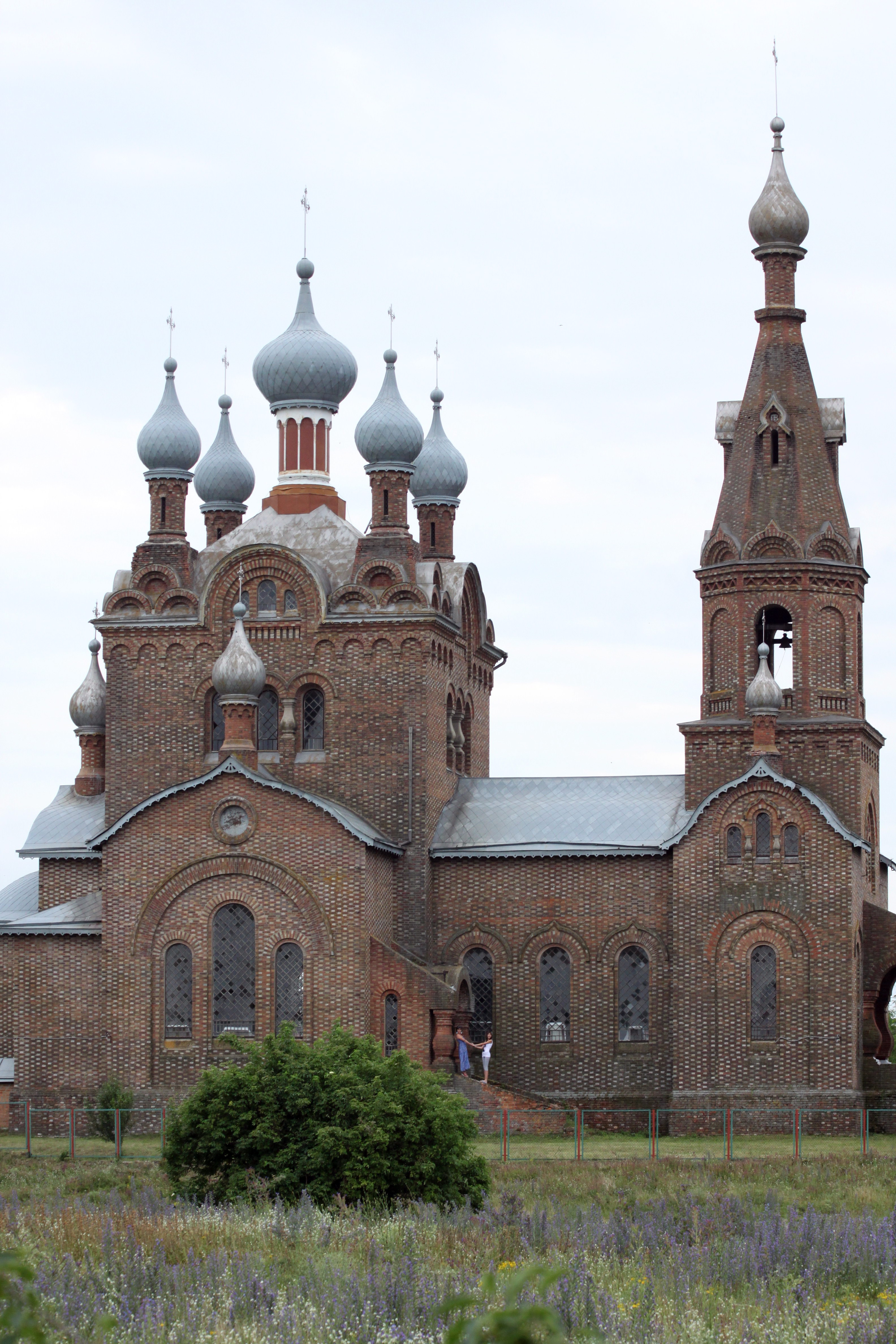 Церква Покровська, с. Покровка, Любашівський район